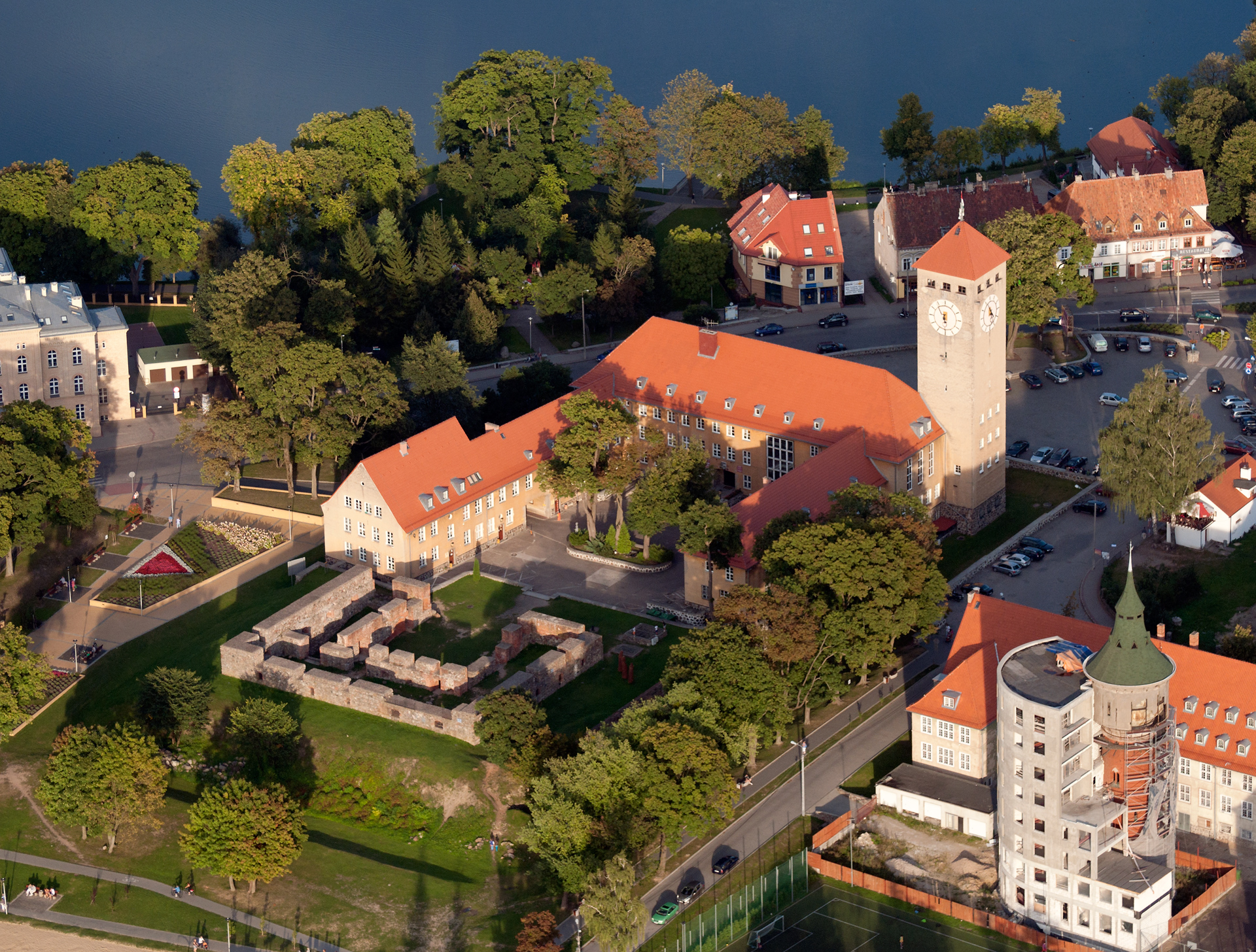 zamek z fosami i otoczeniem Szczytno, ul. Sienkiewicza 1, Szczytno (gmina miejska)